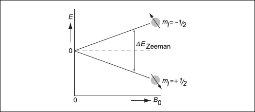 Розщеплення енергетичніх уровнів протону у магнітному полі